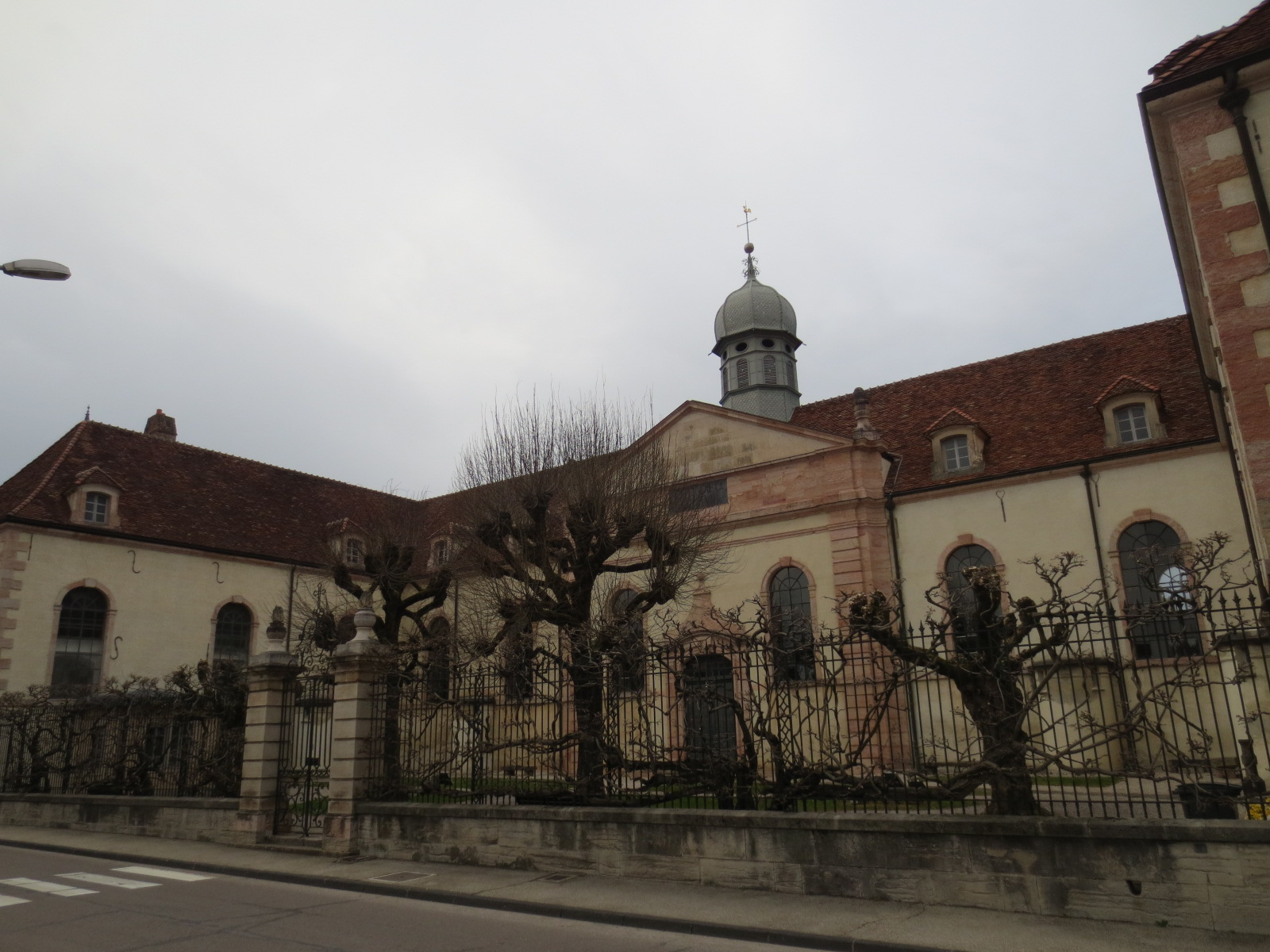 Hôtel-Dieu de Louhans